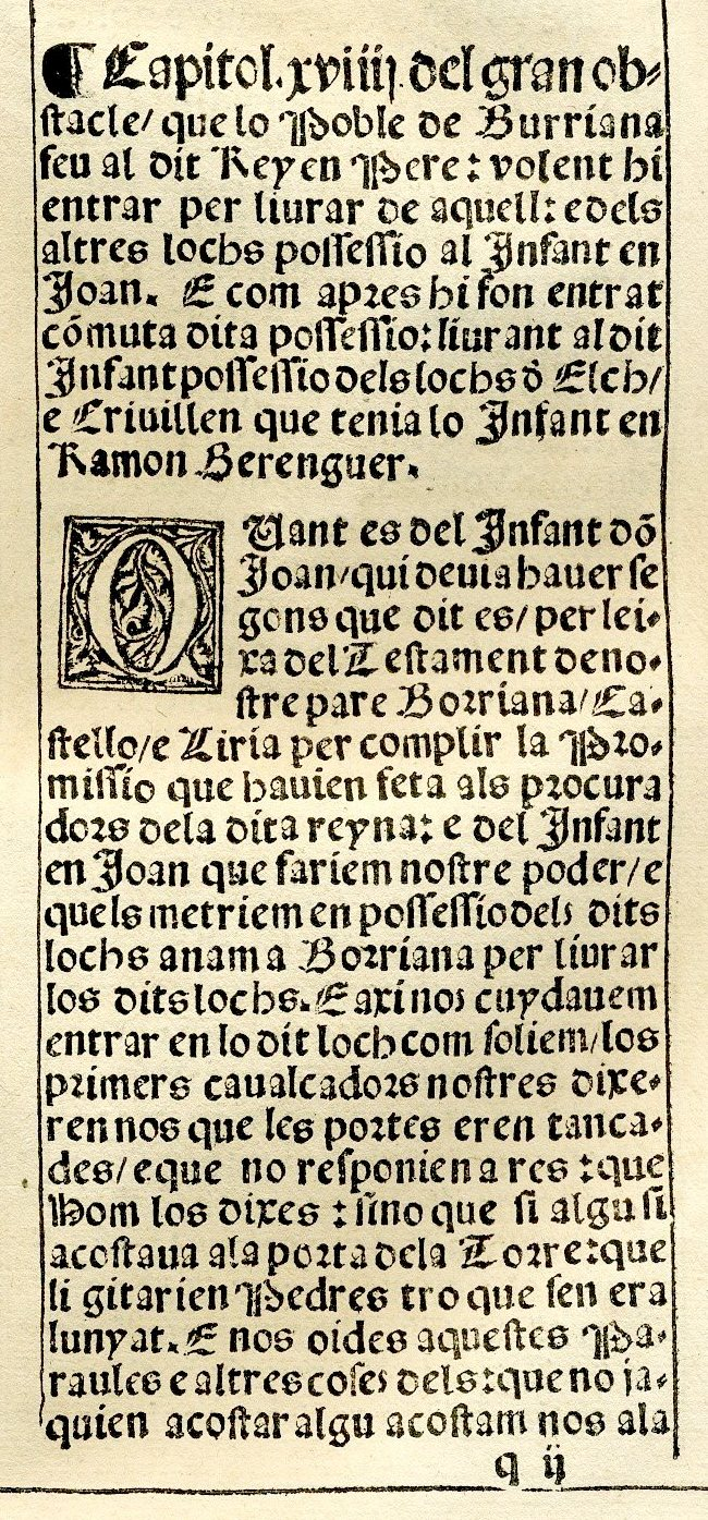 El nom original és Chrònica o hystòria de Espanya / composta e hordenada per Pere Miquel Carbonell, archiver del Rey Nostre Senyor e not[ari] públich de Barcelona.